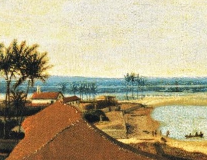 Forte Ernesto, visto do alto da Igreja Calvinista dos Franceses na Cidade Maurícia